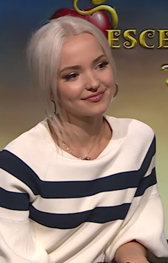 Descendientes 2 narra la historia de “Mal” y sus amigos, los hijos adolescentes de los famosos villanos de Disney